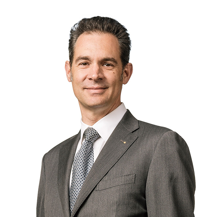 Hugues Hiltpold, PLR Genève